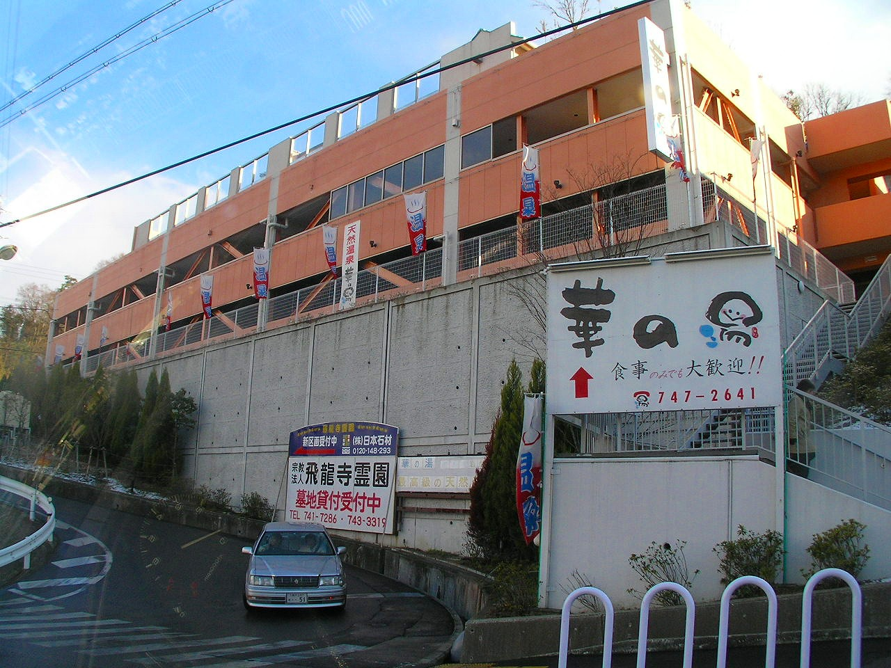 華の湯からの神戸の町並みが一望